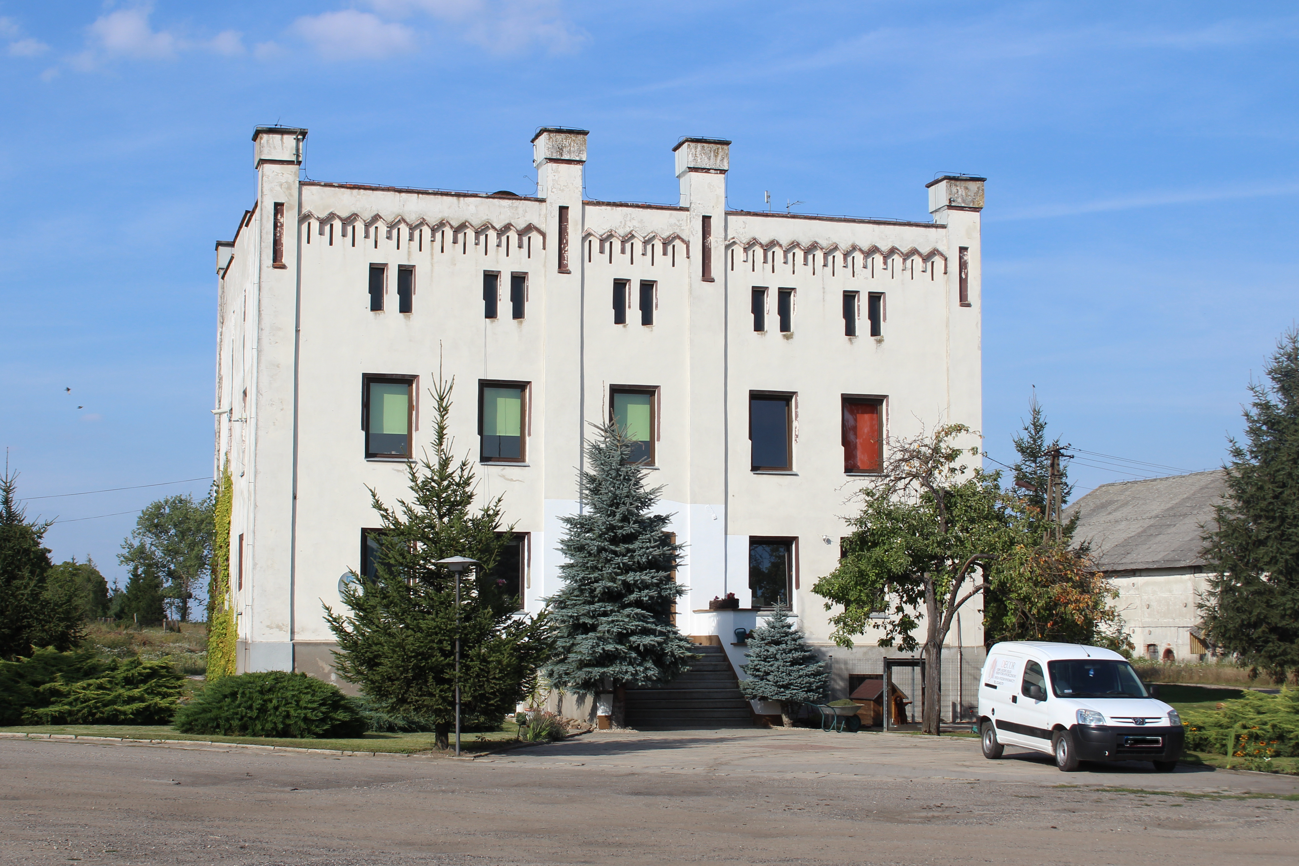 Wójtowice -wieś w Polsce w województwie opolskim, w powiecie brzeskim w gminie Grodków.